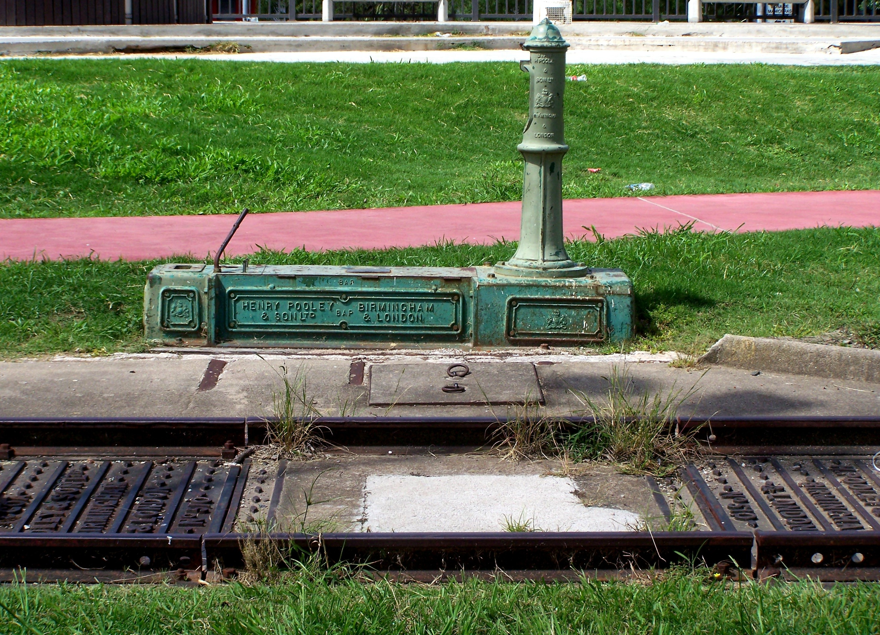 Báscula para pesar vagones del Ferrocarril General Oeste Argentino. Fabricante "H. Pooley & Son". en Villa María, Córdoba.